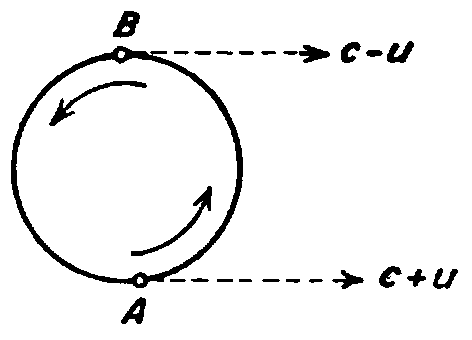 Doppelsterne und Lichtgeschwindigkeit